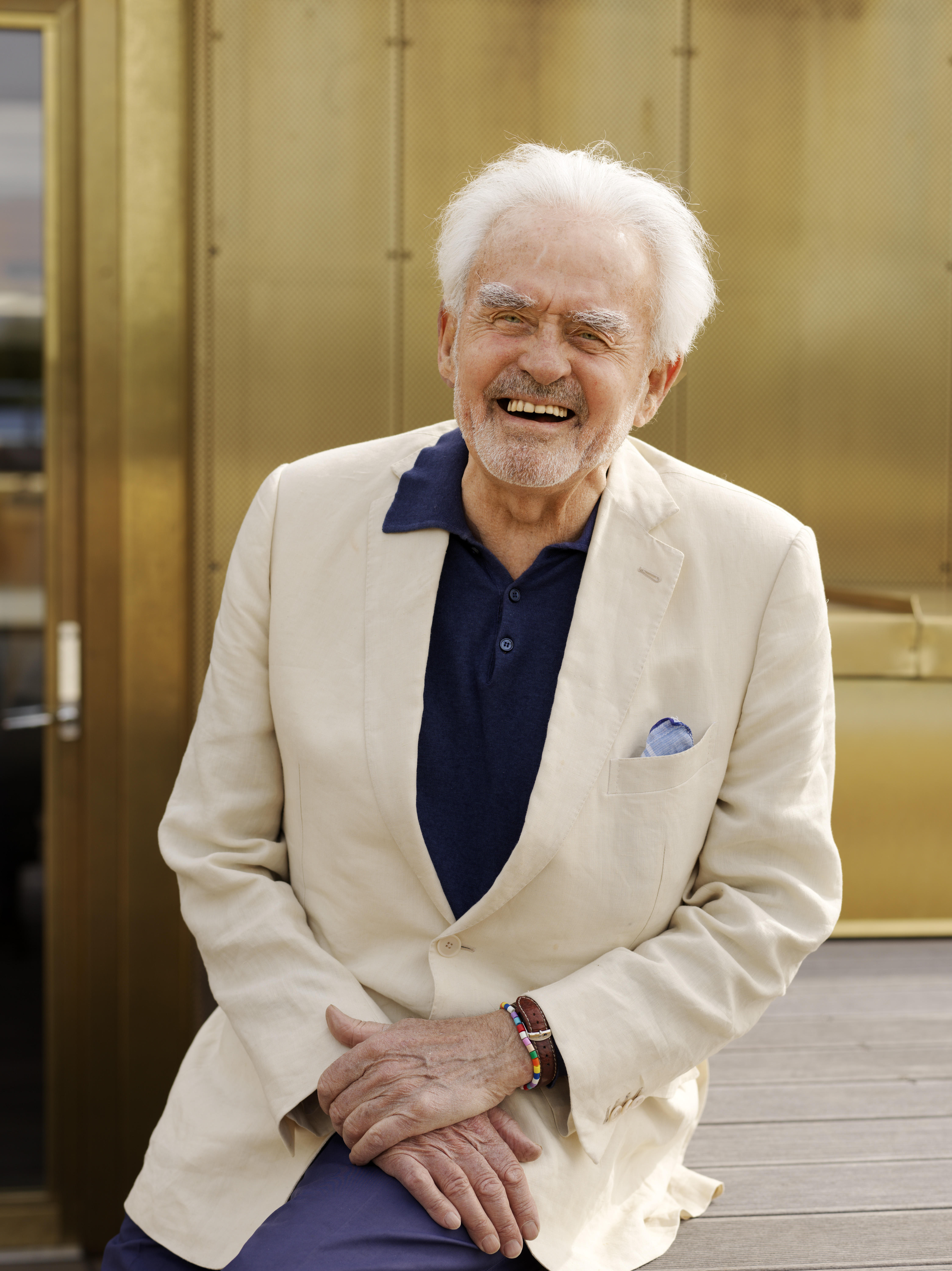 Sven-Harry Karlsson.